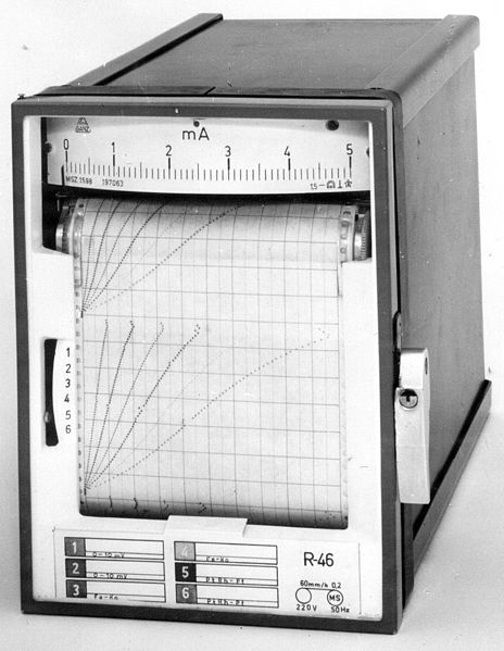 Hatcsatornás pontíró műszer mV és hőelem bemenetekkel.